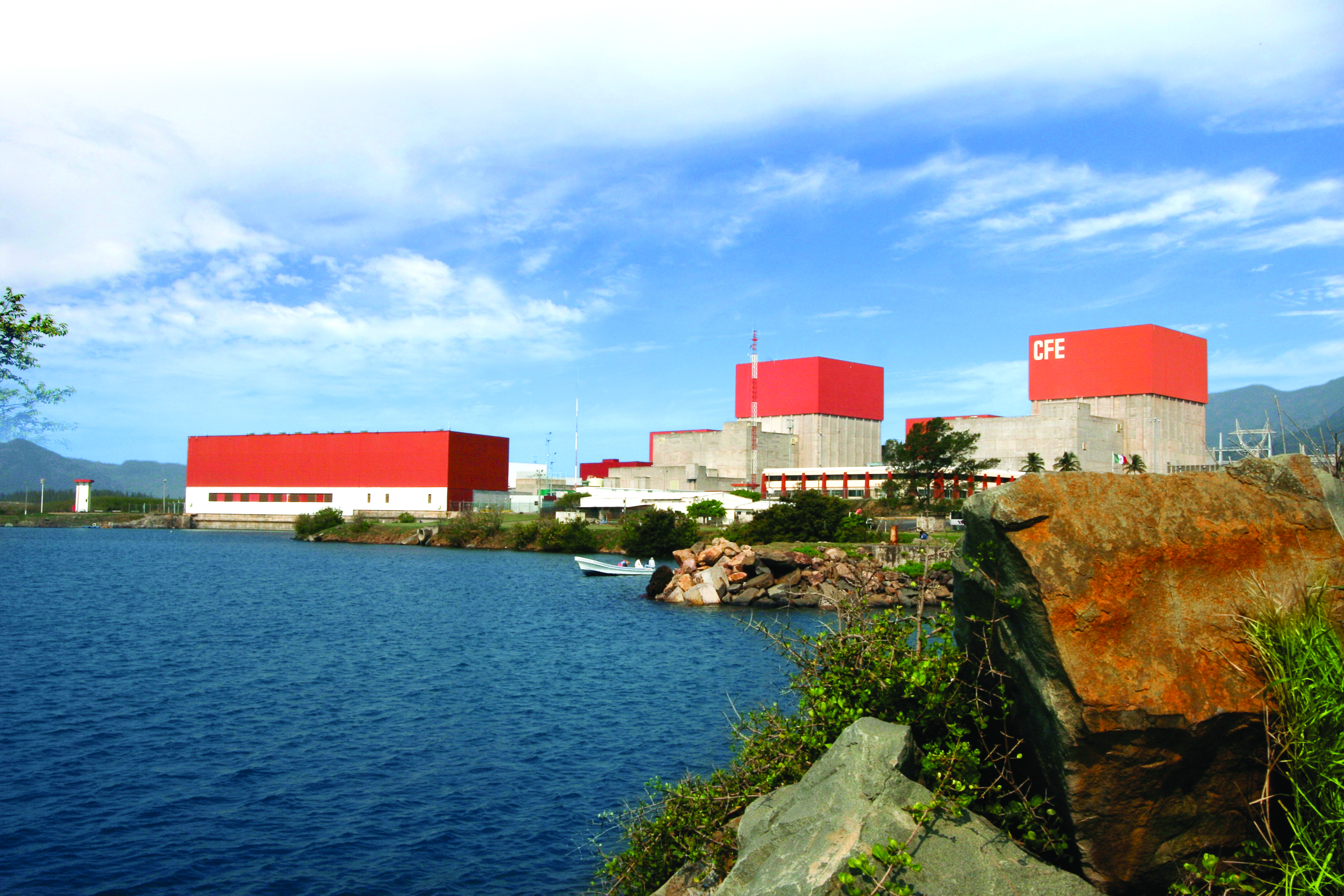 Mirade externa de la CNLV